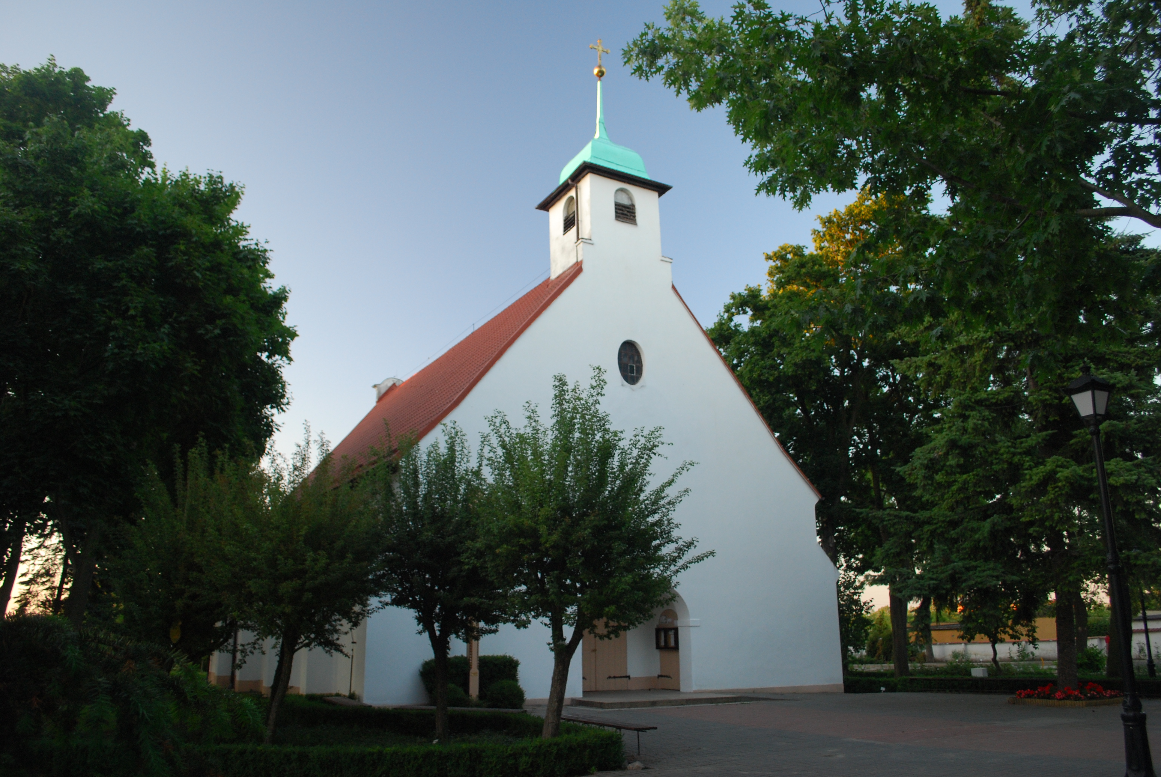 Pruszcz Gdański, ul. Chopina - kościół p.w. Matki Boskiej Nieustającej Pomocy (zabytek nr rejestr. A-1848)